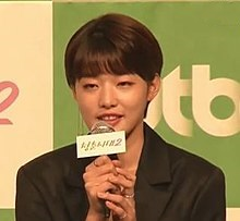 22일 오후 서울 영등포 타임스퀘어 아모리스에서 JTBC 금토드라마 '청춘시대2' 제작발표회가 열렸다.